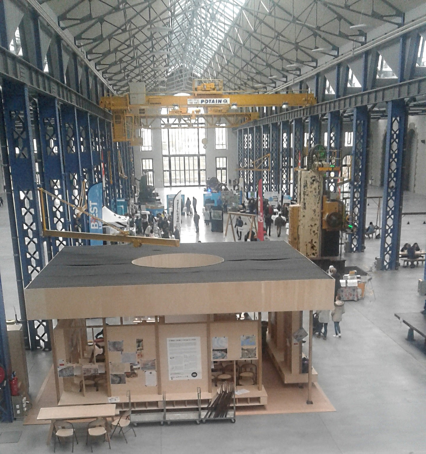 Le hall d'exposition des Ateliers des Capucins à Brest en 2017